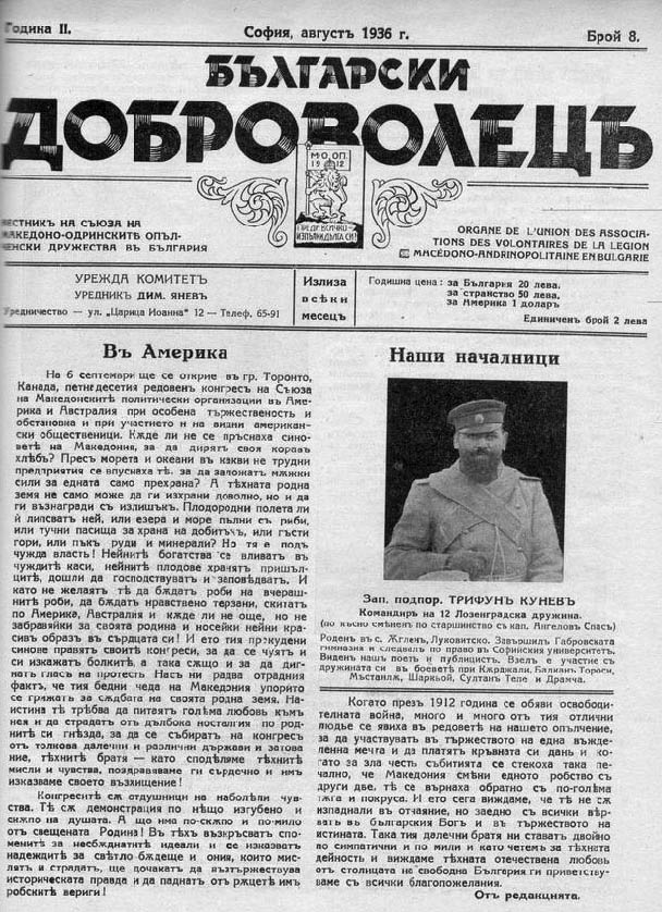 Брой на Български доброволец.